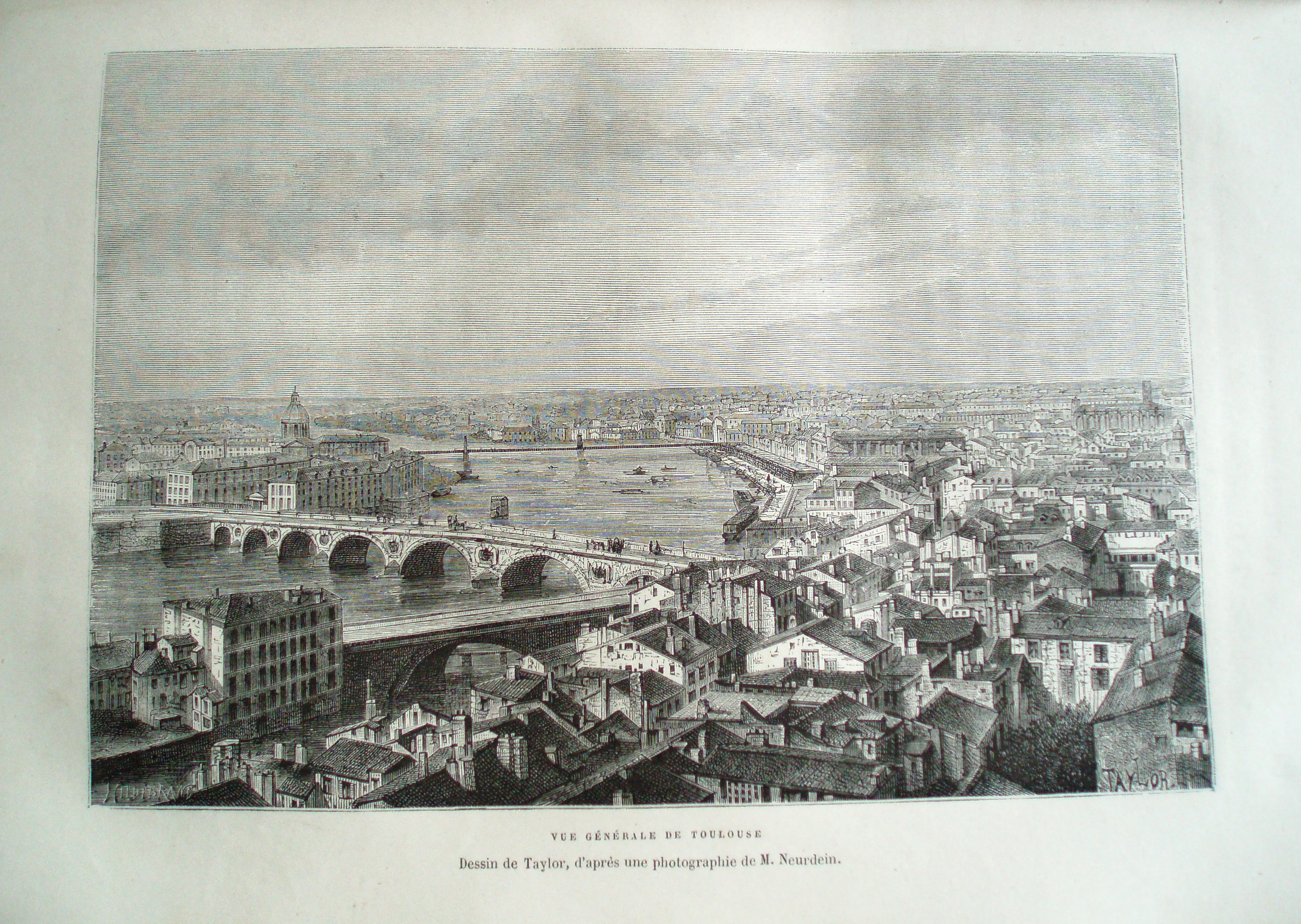 Vue générale de Toulouse, dessin de Taylor, d'après une photographie de M. Neurdein, in: Élisée Reclus, Nouvelle géographie universelle, t.2: La France, 1877, p. 119.